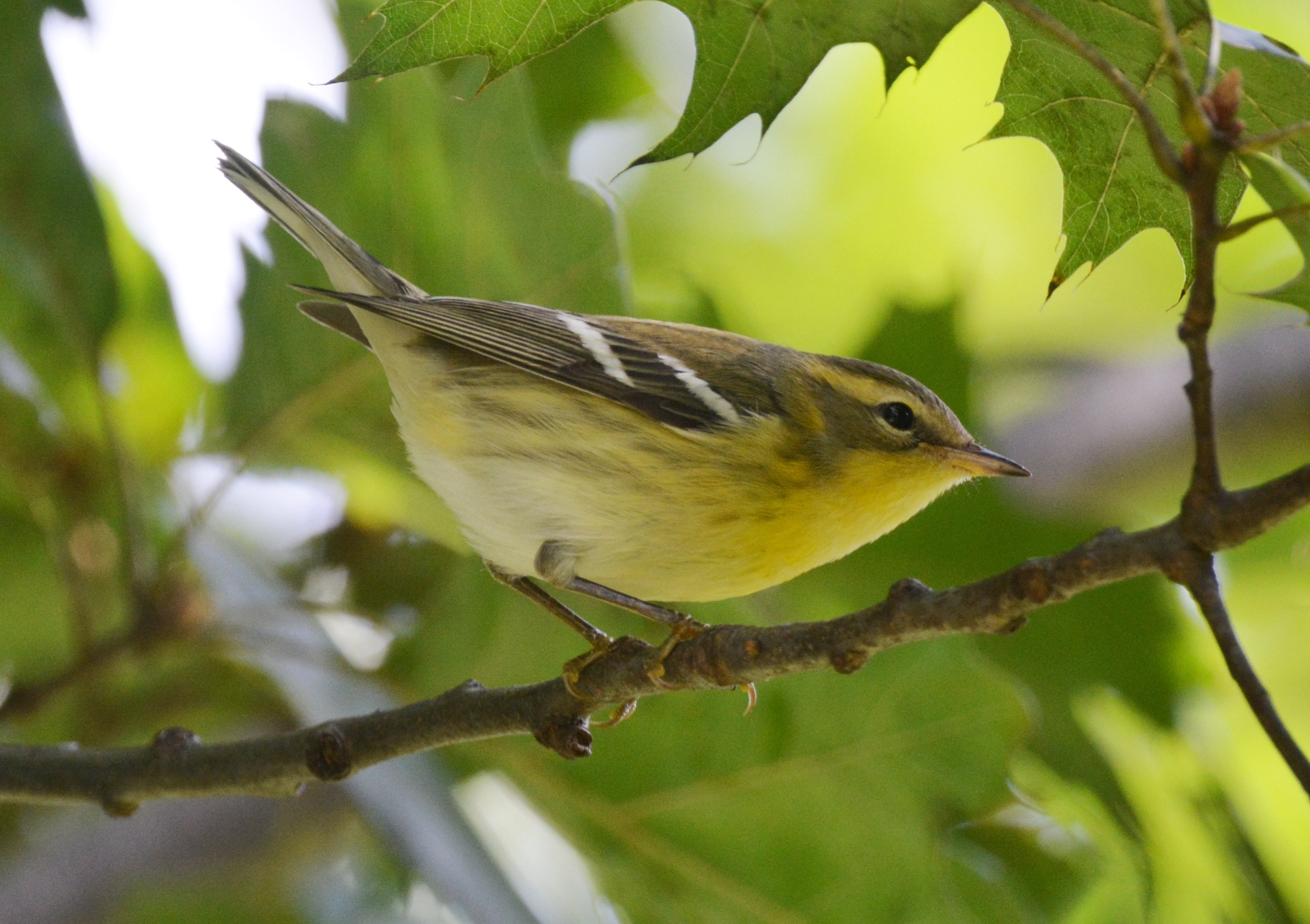 Carondelet Park 9/12/15